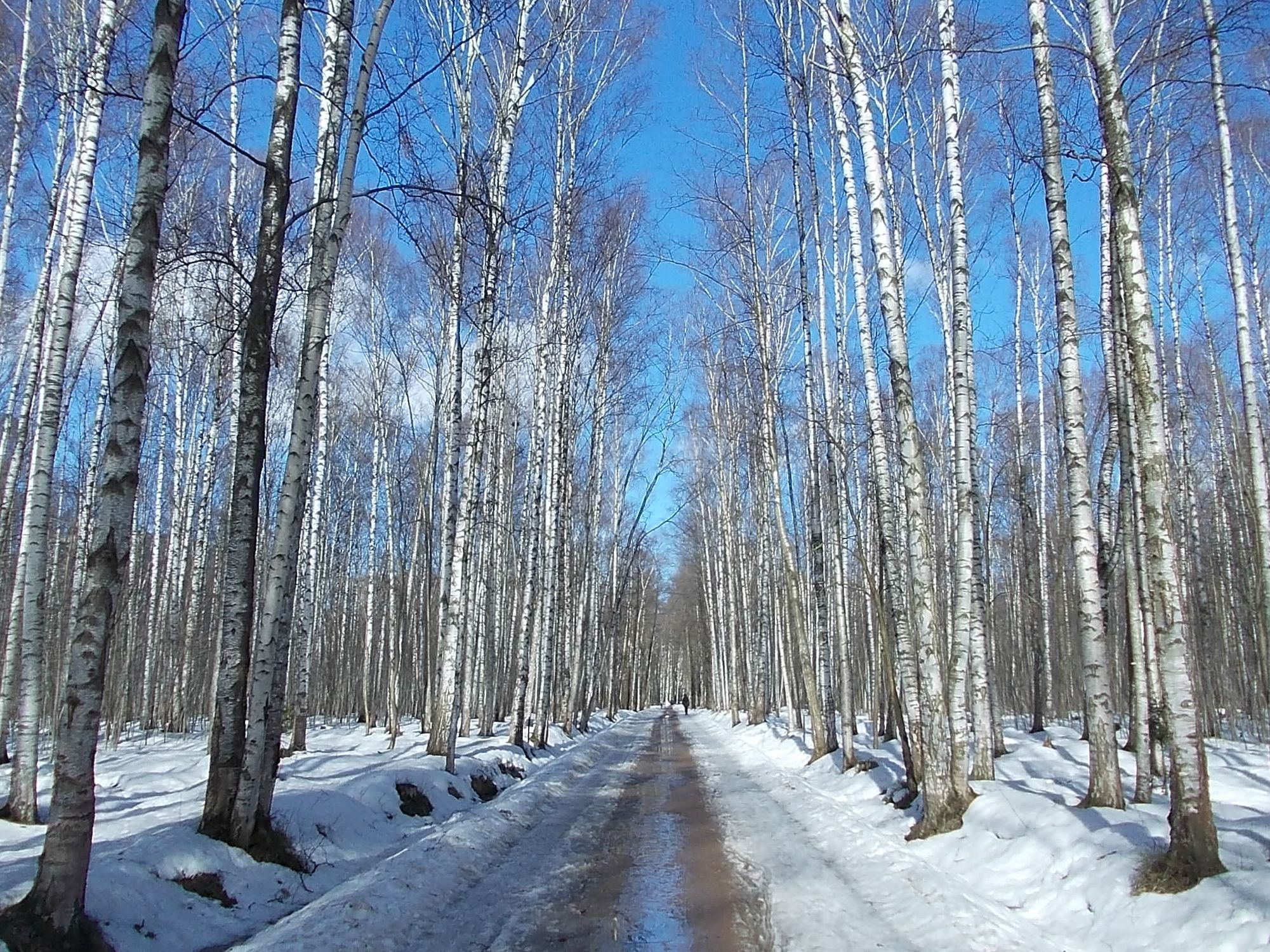 Аллея в Удельном парке весной